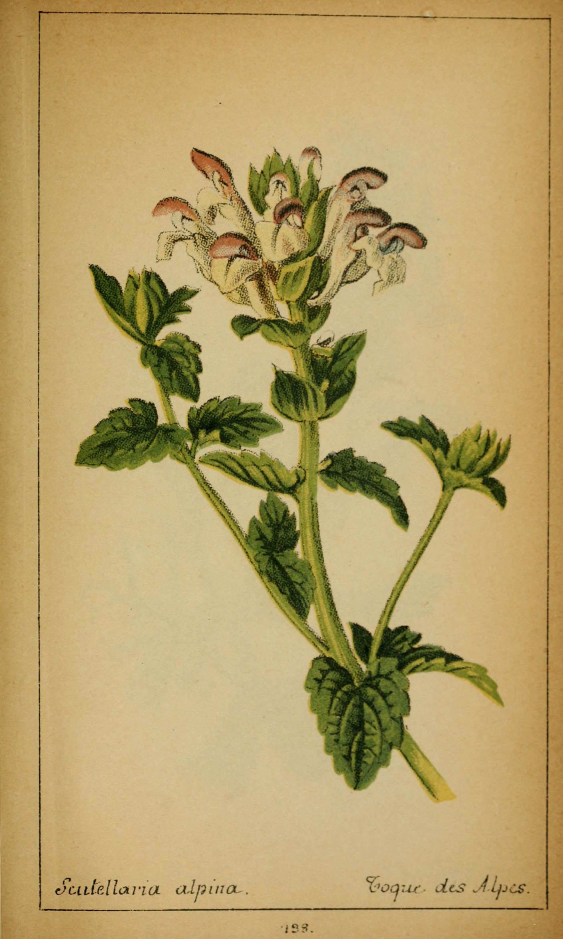 c'^udellana alpma- uoq:xx- des ^'i ijjc^. i?.?.